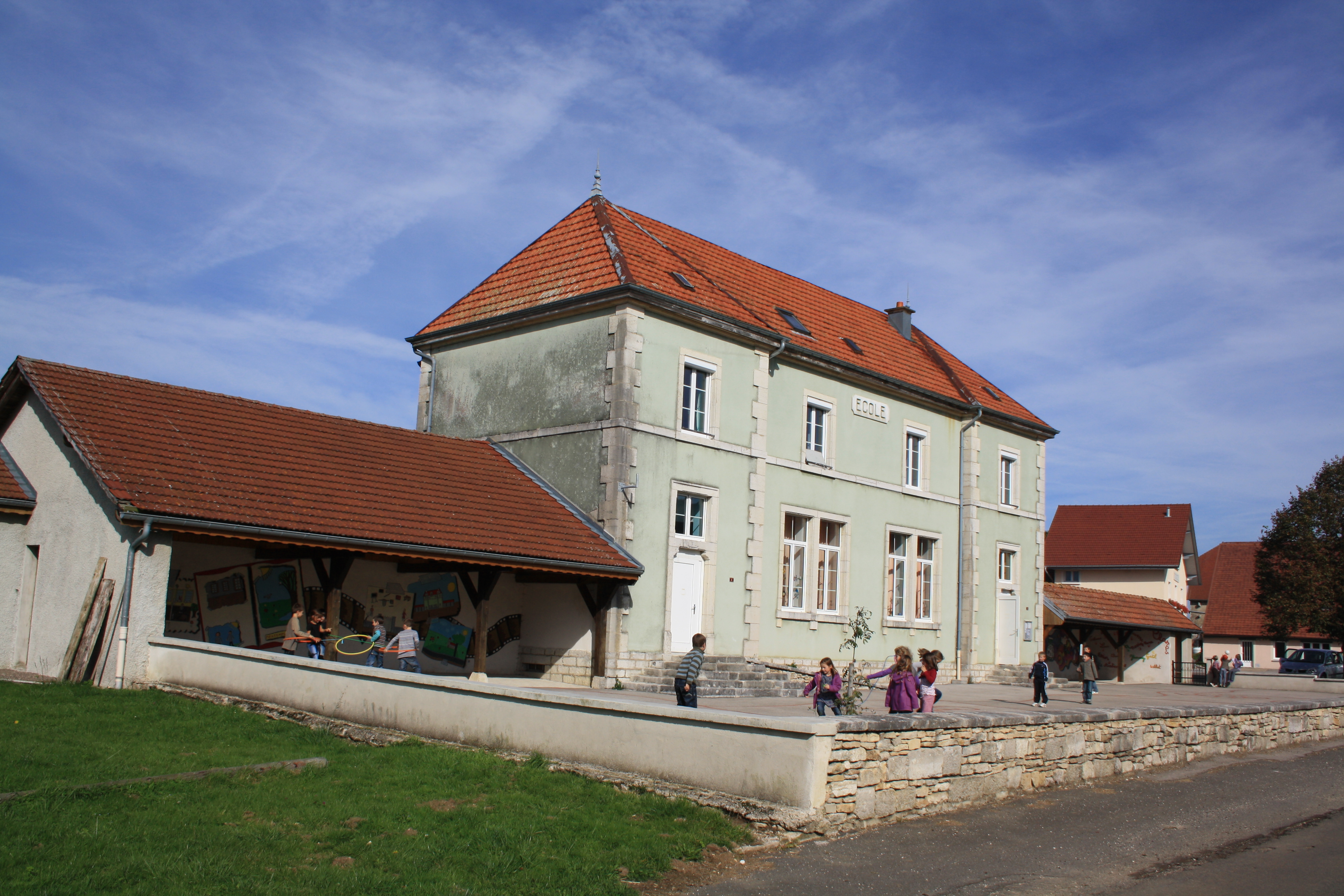 Schule in Les Plains-et-Grands-Essarts